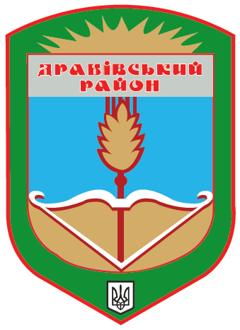 Герб Драбівського району Черкаської області